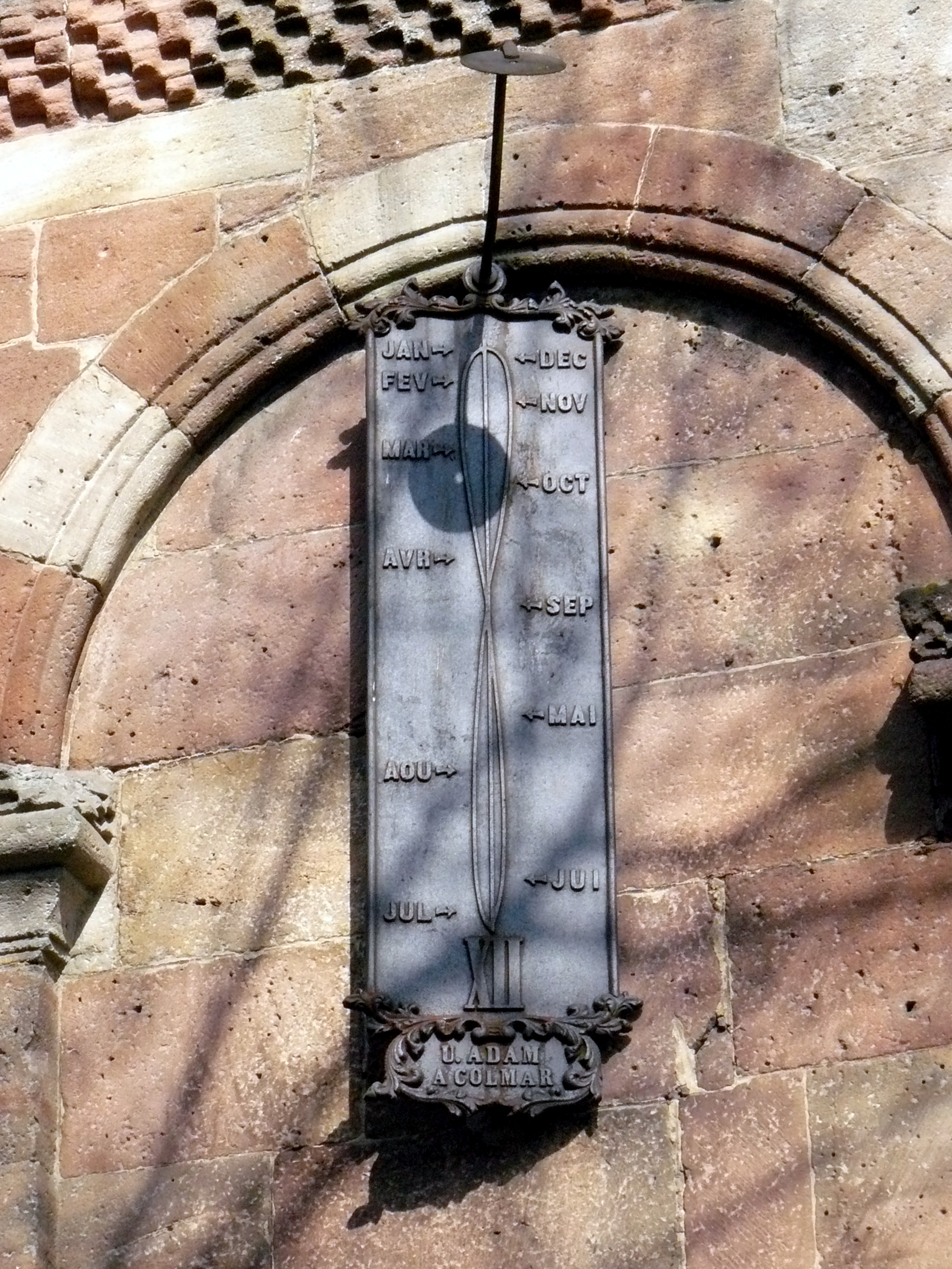 Cadran solaire indiquant la date dans l'année. Eglise de Lautenbach (Haut-Rhin, France). Photo prise un 10 mars en milieu de journée.